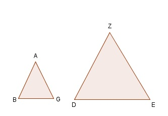 Il·lustració d'una de les proposiciones de les Data d'Euclides